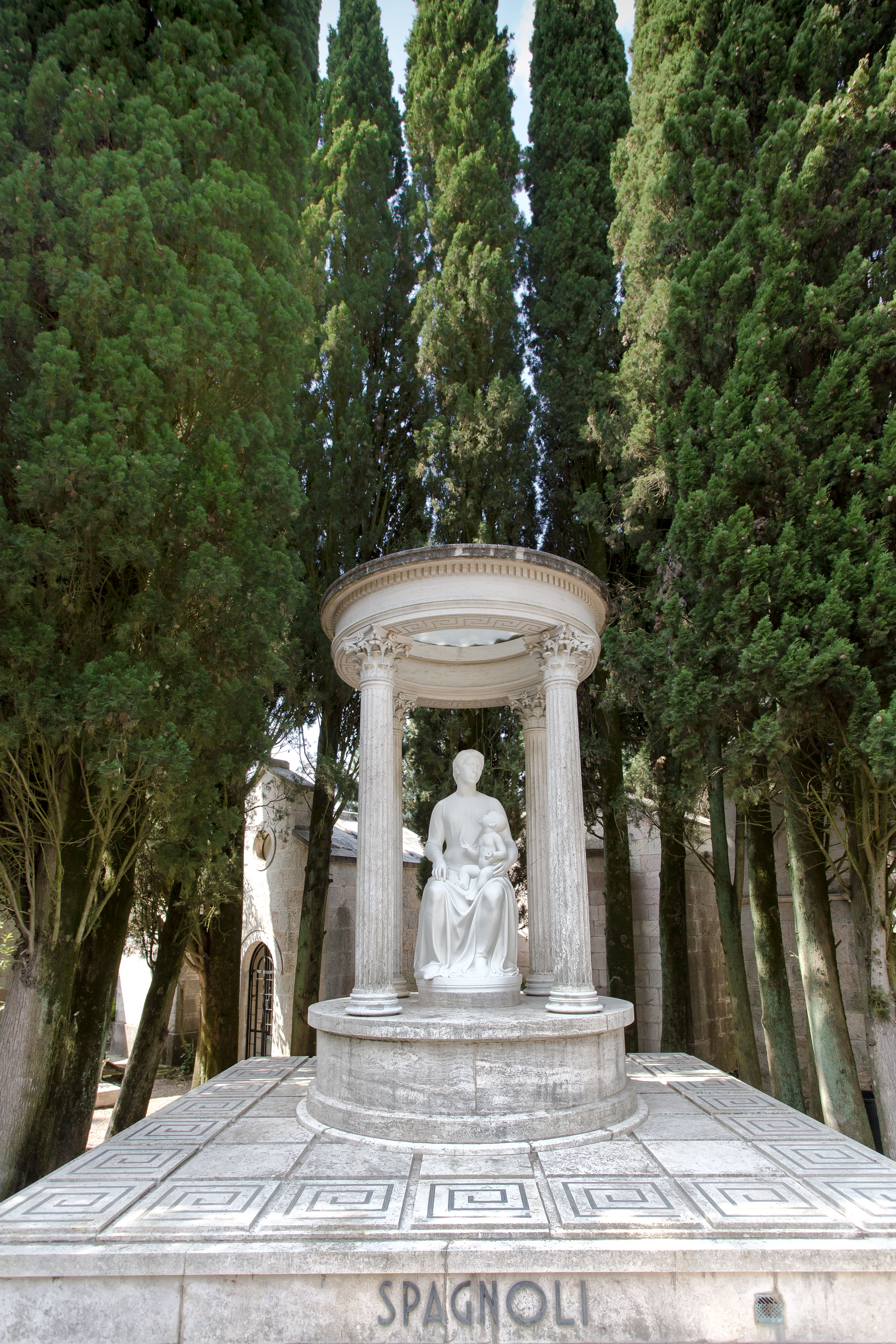 Cimitero Monumentale - anno 1939 This is a photo of a monument which is part of cultural heritage of Italy.